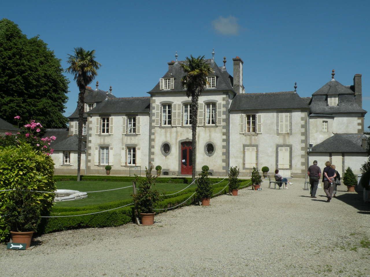 Cour d’honneur du château de Montmarin à Pleurtuit.